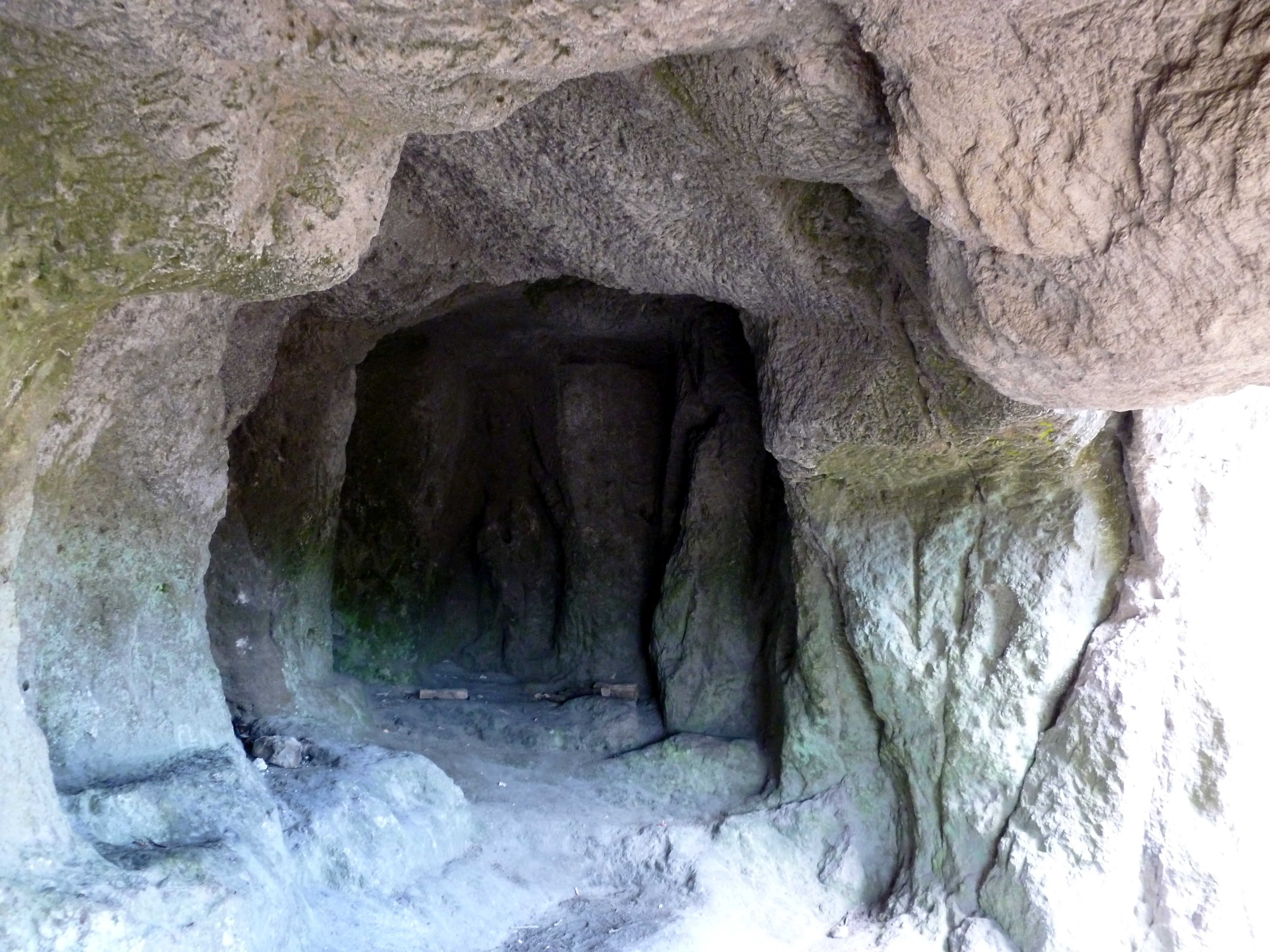 L'une des grottes du Cliersou (1 199m).